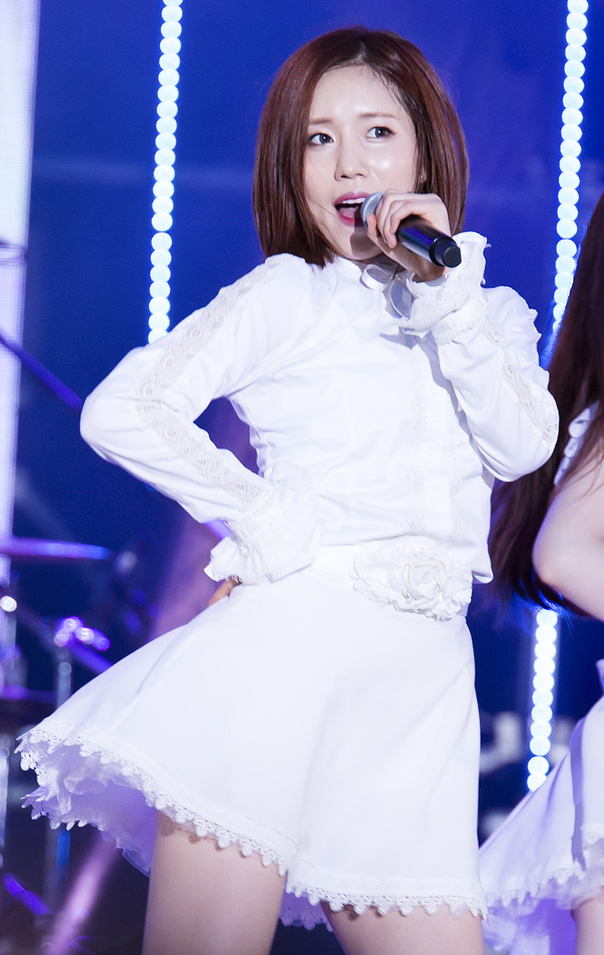 160624 창원 희망음악회 러블리즈